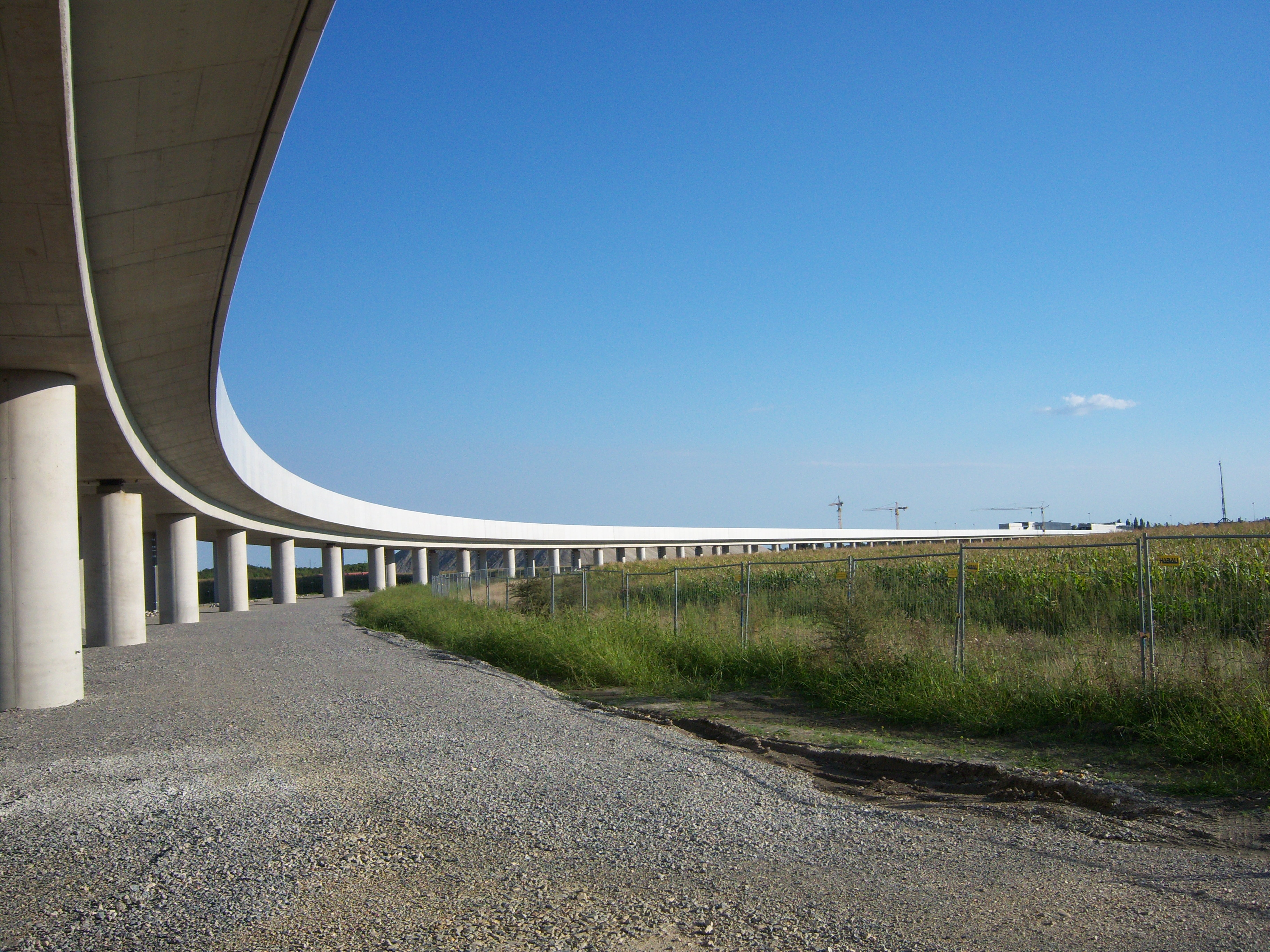 Blick auf die in bau befindliche Trasse der U2 zwischen den Stationen Aspern und Seestadt